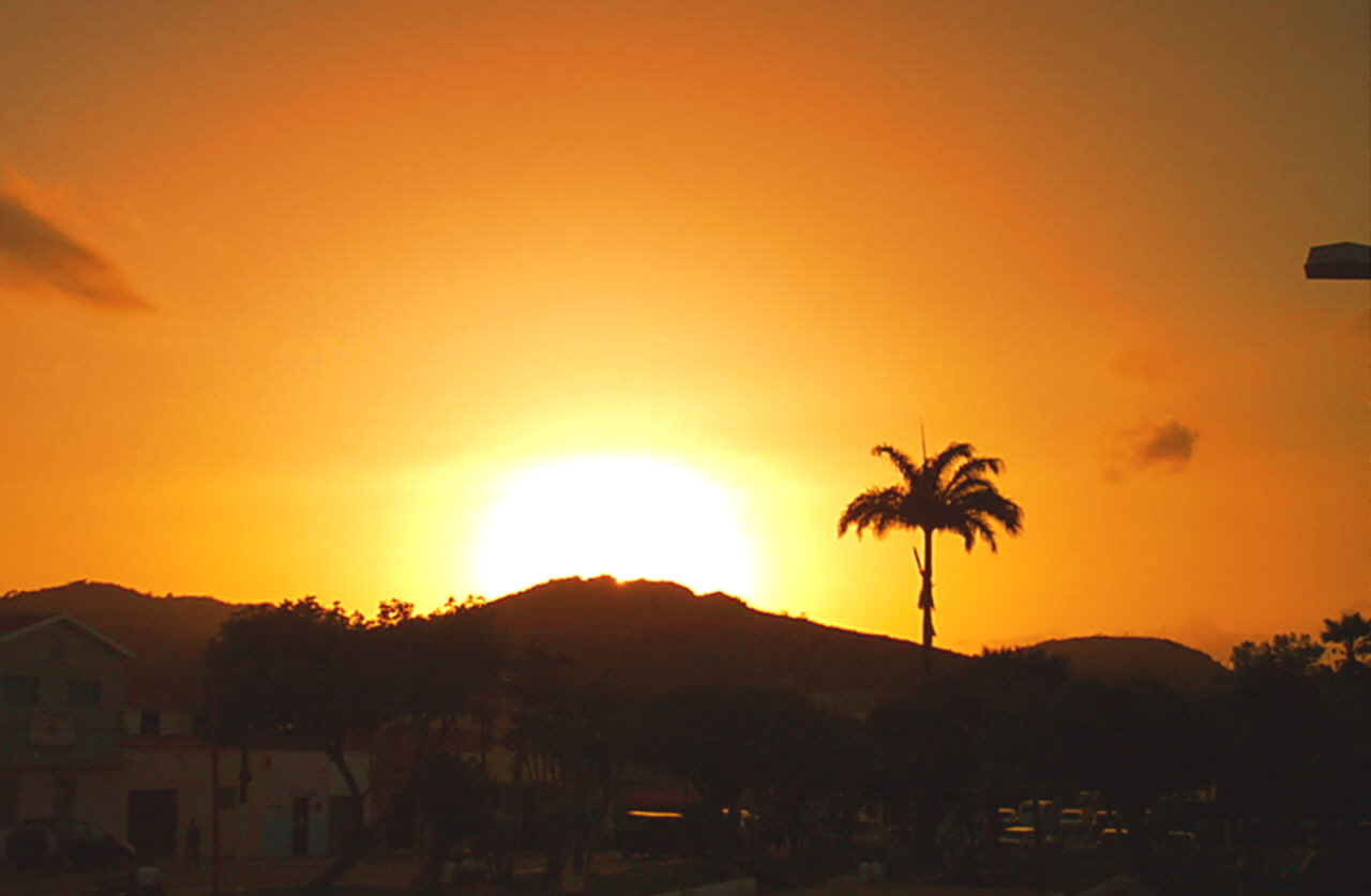 Pôr do sol em Beém, Paraíba